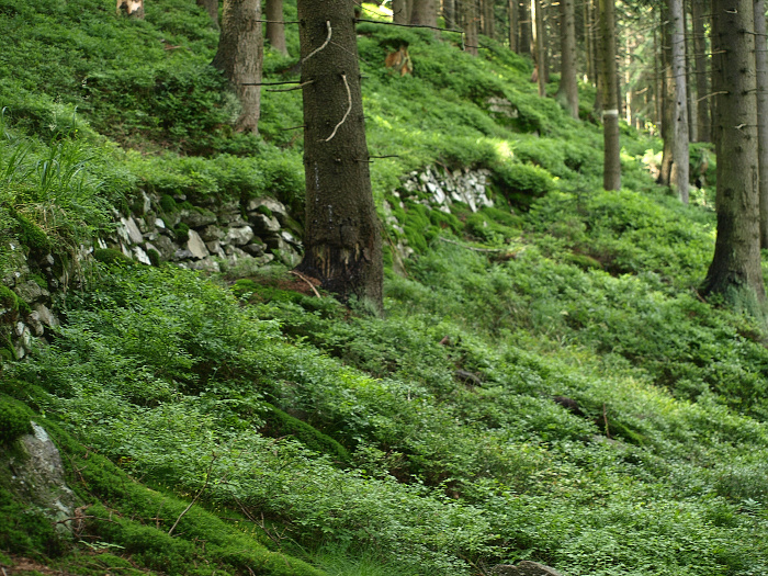 Česky: Pozůstatky lesní železnice